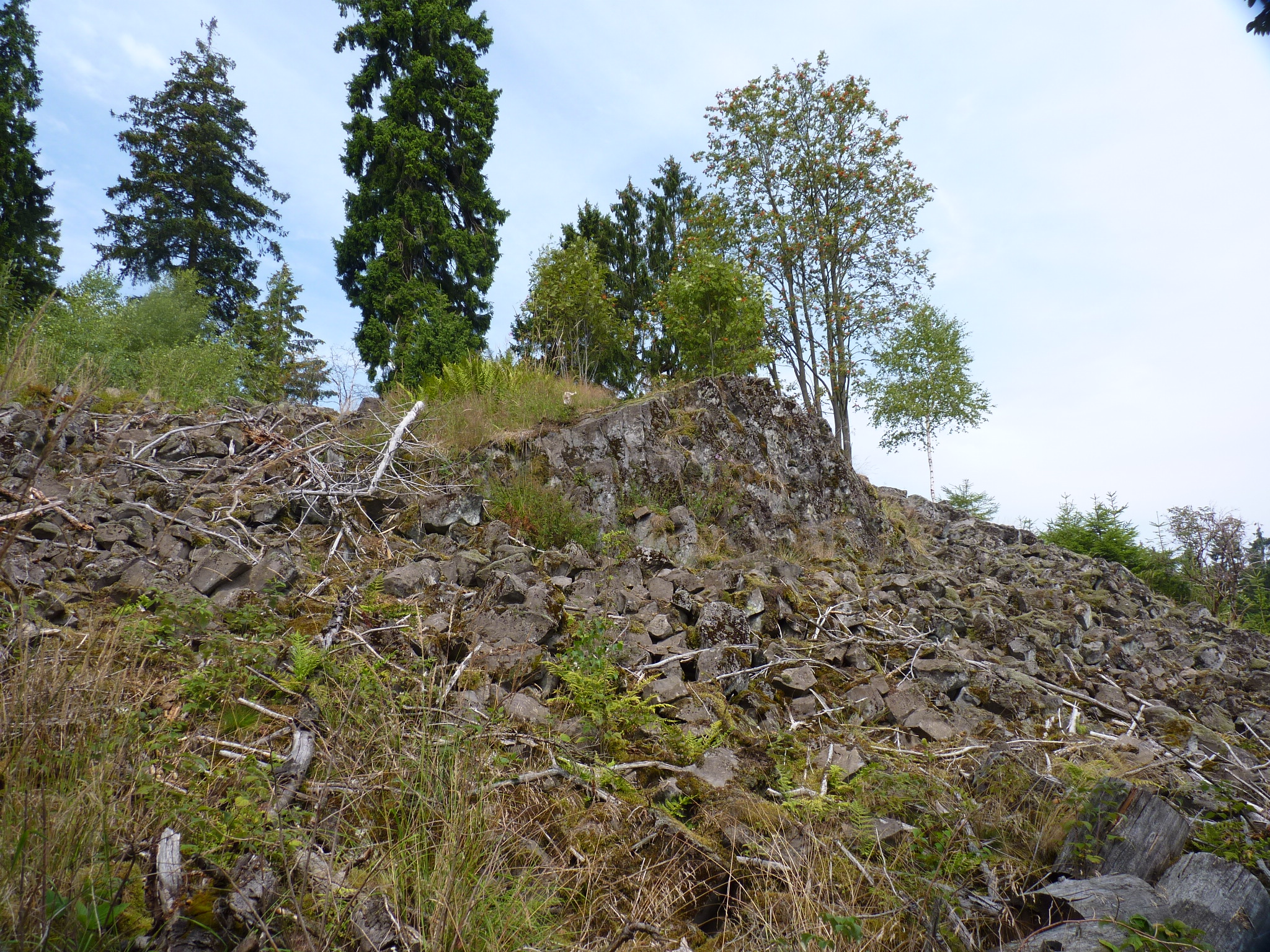 Felsformation Trödelsteine im Sommer